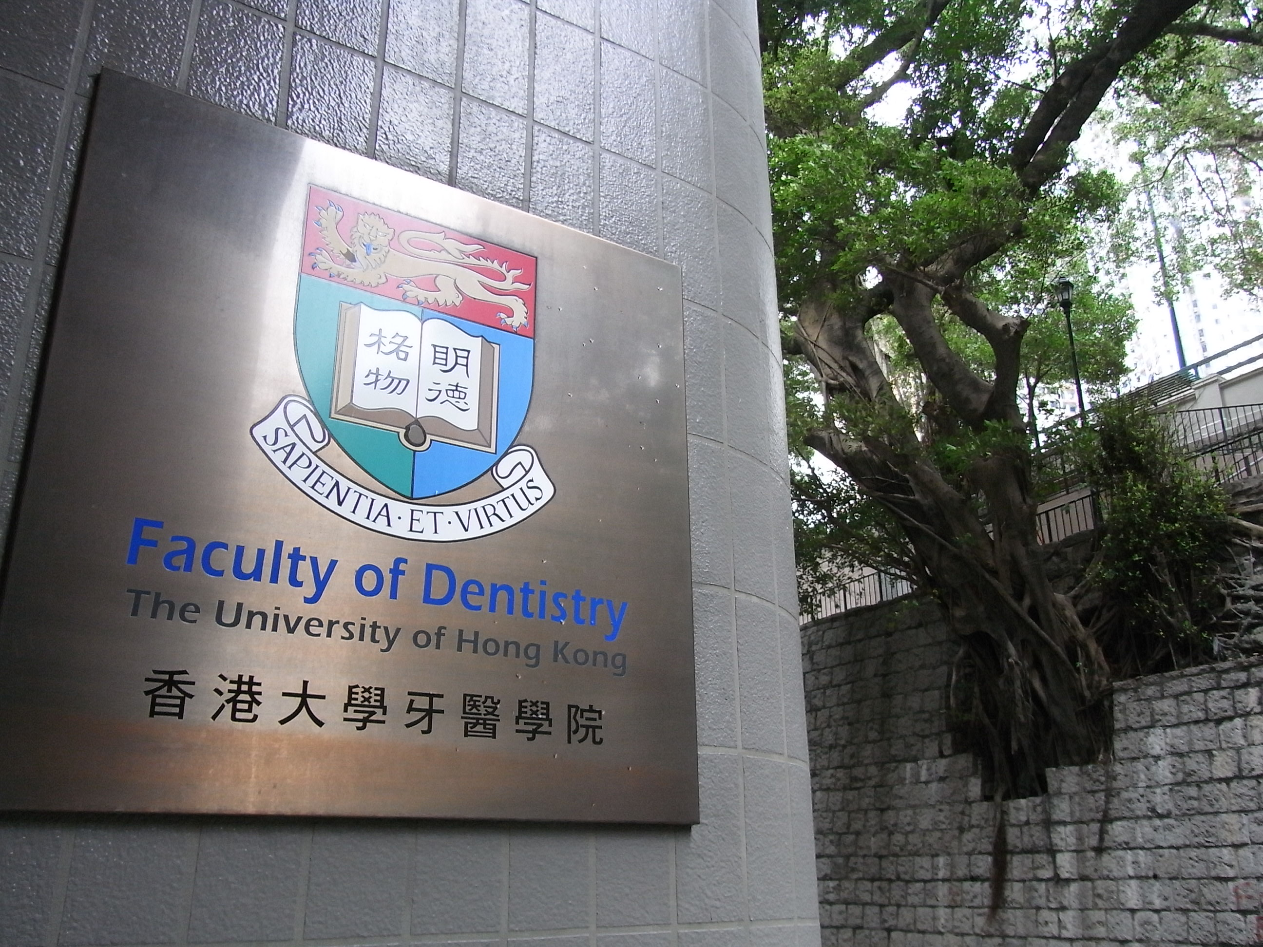 中文（台灣）: 香港大學牙醫學院標誌銘板。